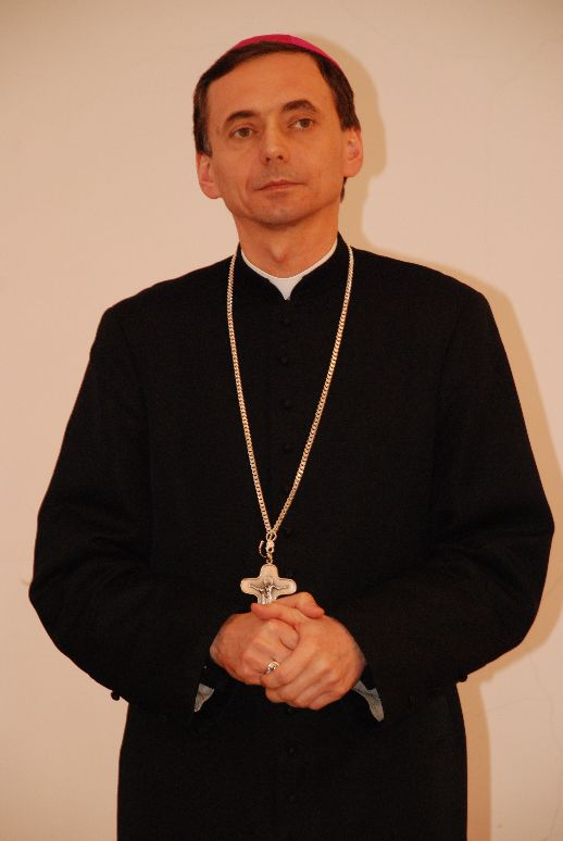 Zdjęcie ks. Adama Bałabucha - biskupa pomocniczego i wikariusza generalnego Diecezji Świdnickiej oraz rektora Wyższego Seminarium Duchownego Diecezji Świdnickiej.